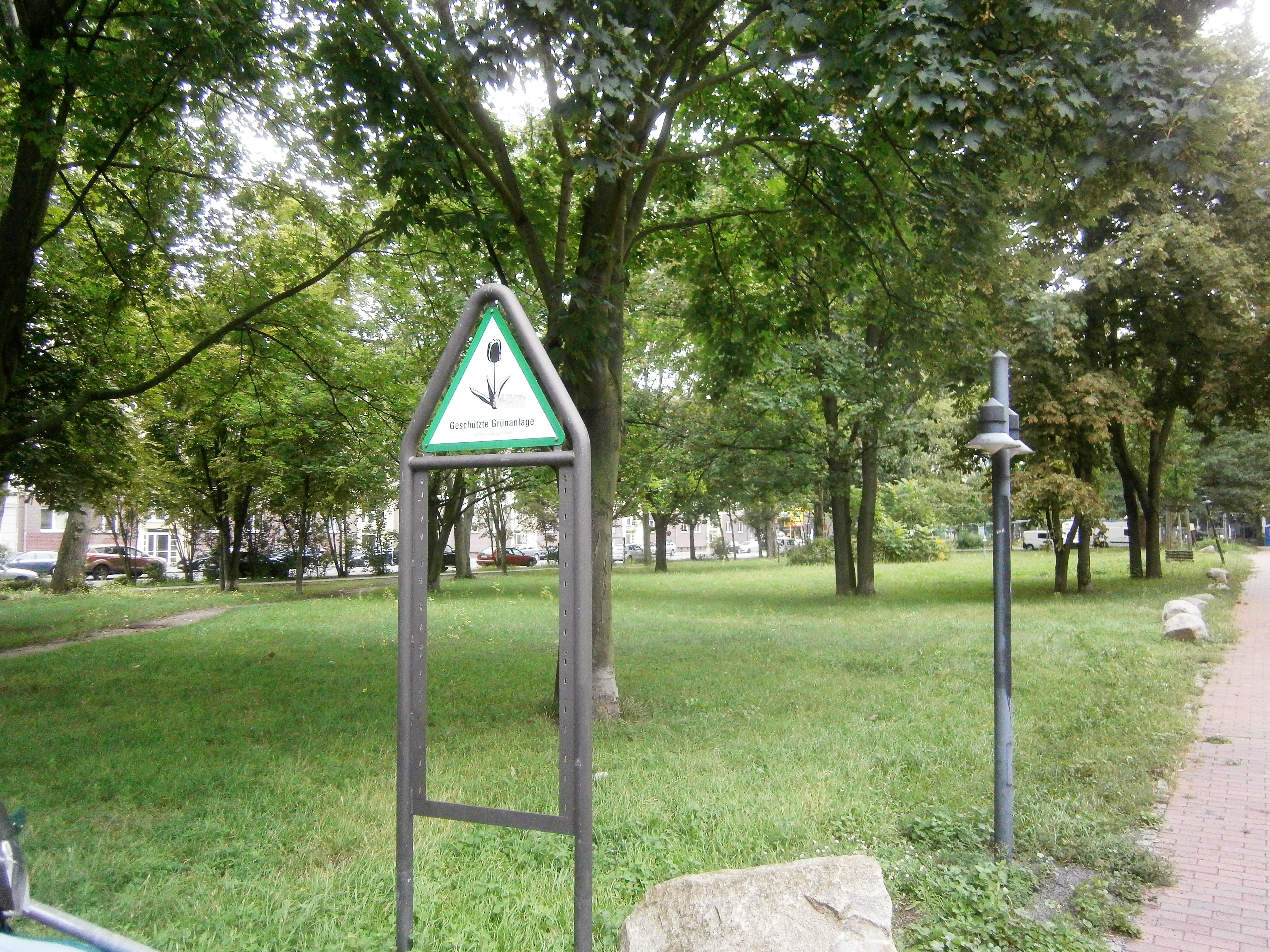 Die Andreasstraße ist eine Straße im Berliner Bezirk Friedrichshain-Kreuzberg, Ortsteil Friedrichshain. Angelegt wurde sie 1862 auf vorherigen Gartenland und 1863 benannt. Bis um 1900 waren die Grundstücke bebaut und bis 1930 wurde verdichtet. Bei Luftangriffen im Zweiten Weltkrieg wurde die Gebäude schwer getroffen. So ist die Straße seit den 1950er Jahren mit wiederhergestellten Altbauten, aber besondres durch Plattenbau-Wohnblöcke aber seit 1990 auch durch Hotel- und Bürobauten im Umfeld des Ostbahnhofs charakterieisiert. Das Bild zeigt: begrünte Freifläche vor dem Seniorenheim Bethel, Andreasstraße 21. Es sind die beräumten Flächen der im Krieg zerstörten Wonhäuser auf Grundstück Andreasstraße 15—22.